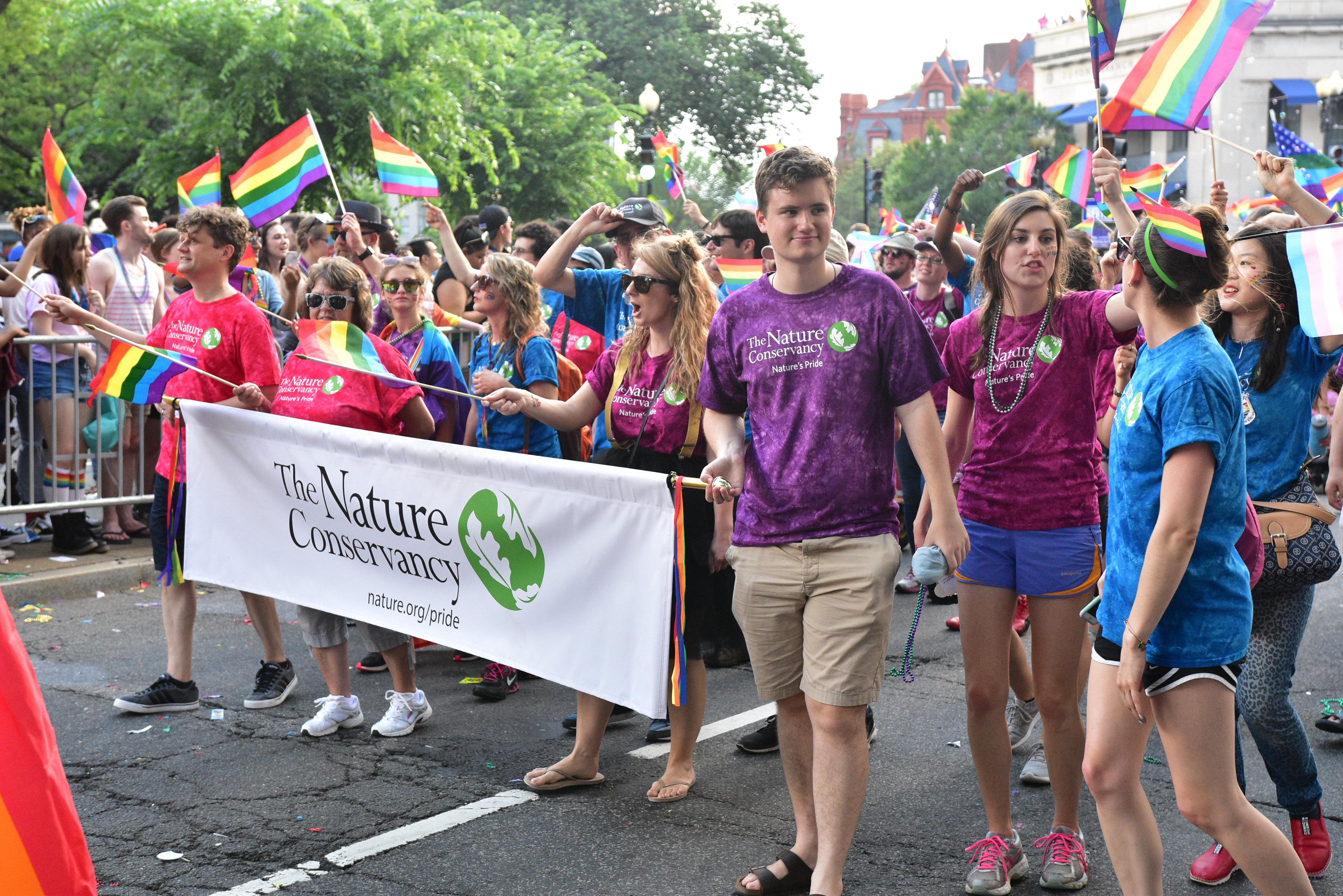 Capital Pride Parade 2018